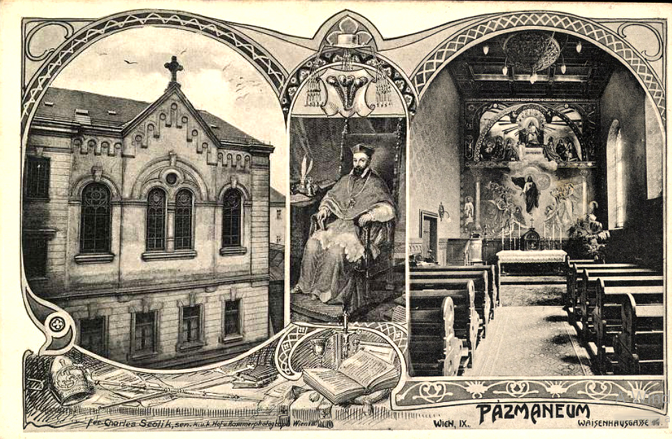 Régi képeslap 1900 körül, Pazmaneum, Wien, IX., Waisenhausgasse 14.